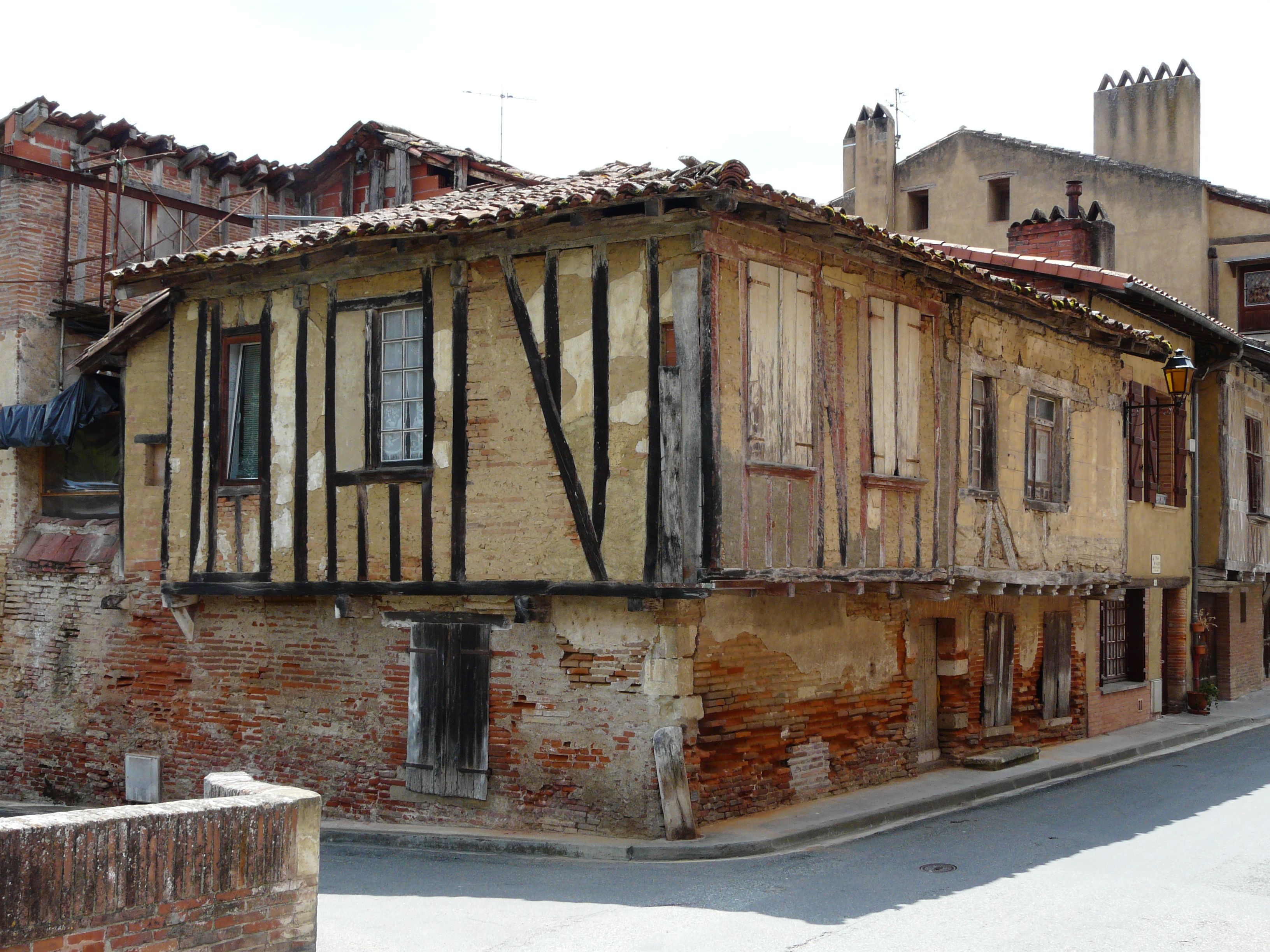 Maison à colombages à côté du pont de Lajoux, à l'angle de la place de Lastic, Rieux-Volvestre, Haute-Garonne, France.